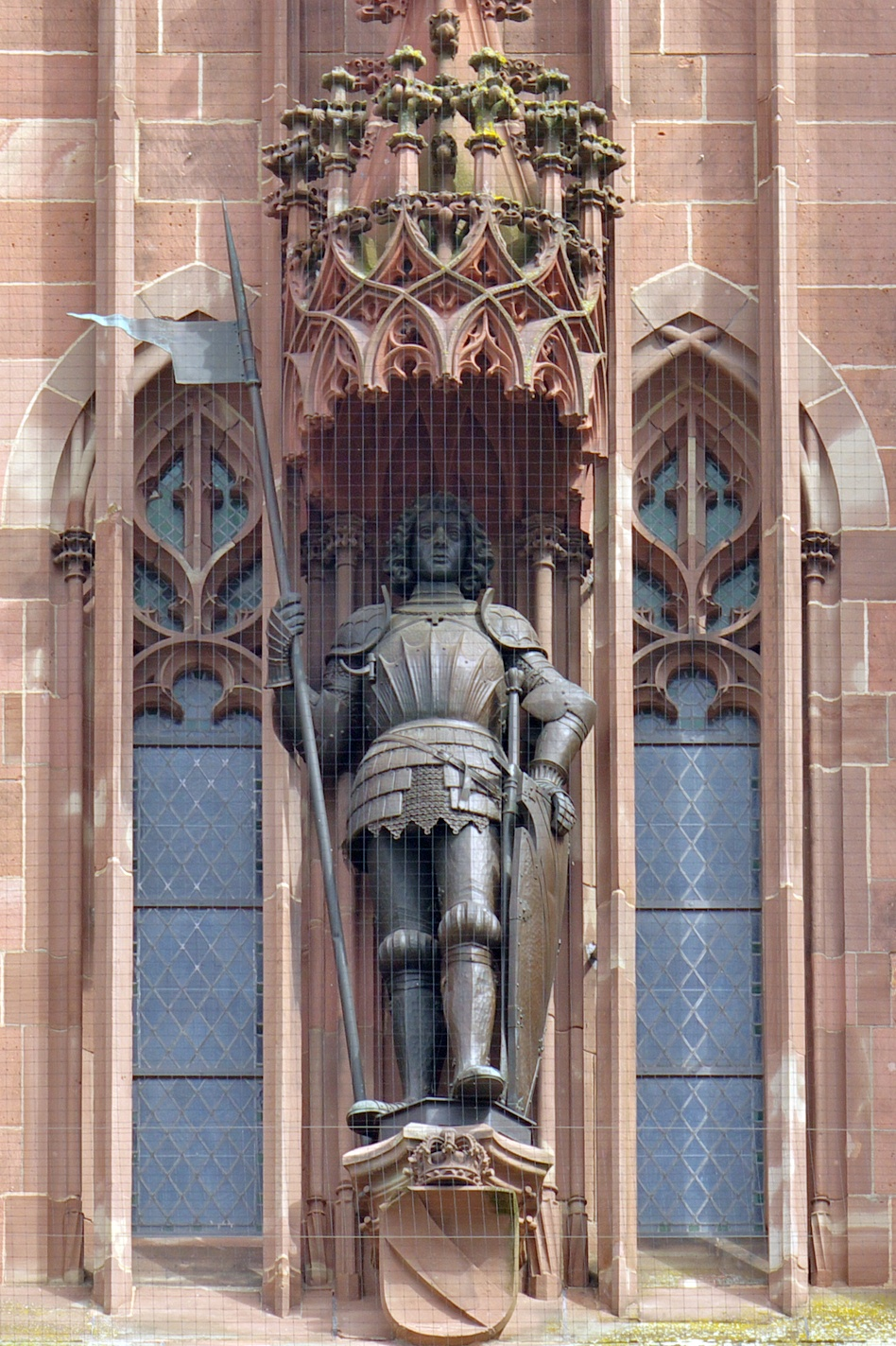 Fridolin Dietsches Standbild Bernhards II. von Baden an der Kirche St. Bernhard in Karlsruhe